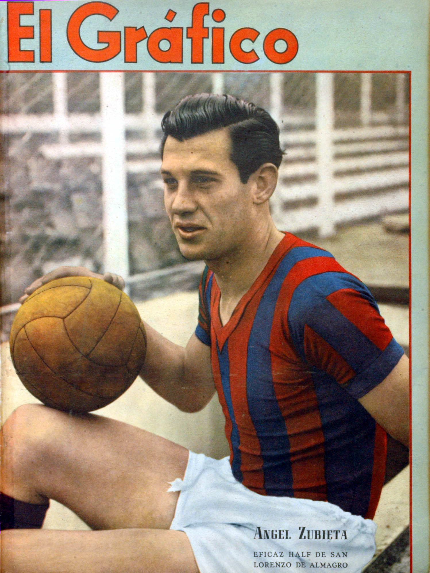 El Grafico del 17 de Enero de 1941. Edicion 1123